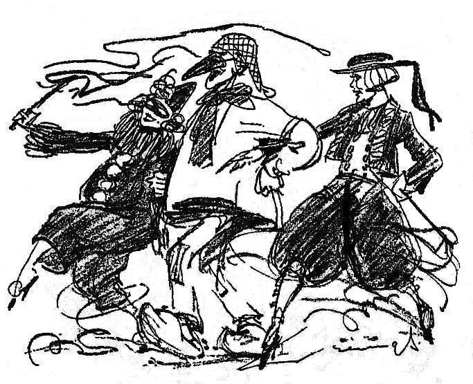 Trois joyeux parisiens en Carnaval à la Mi-Carême 1929.